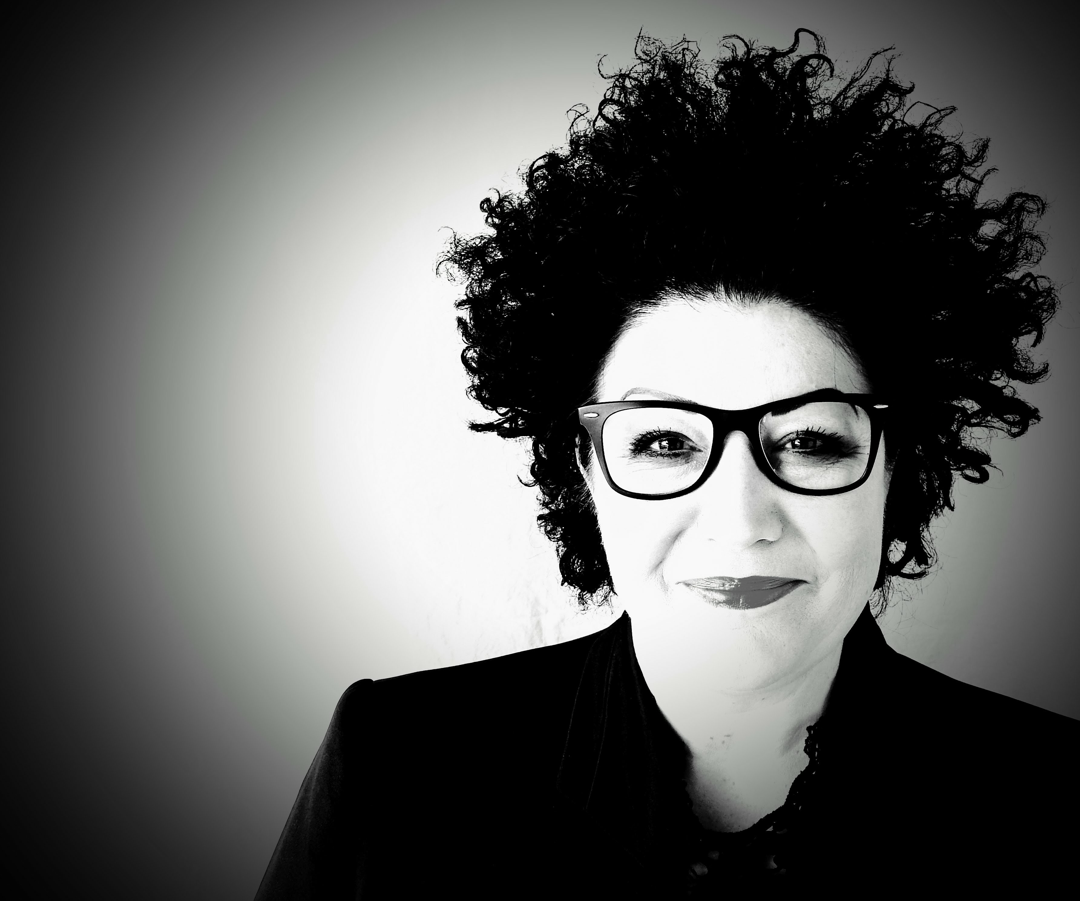 Petra Bonmassar